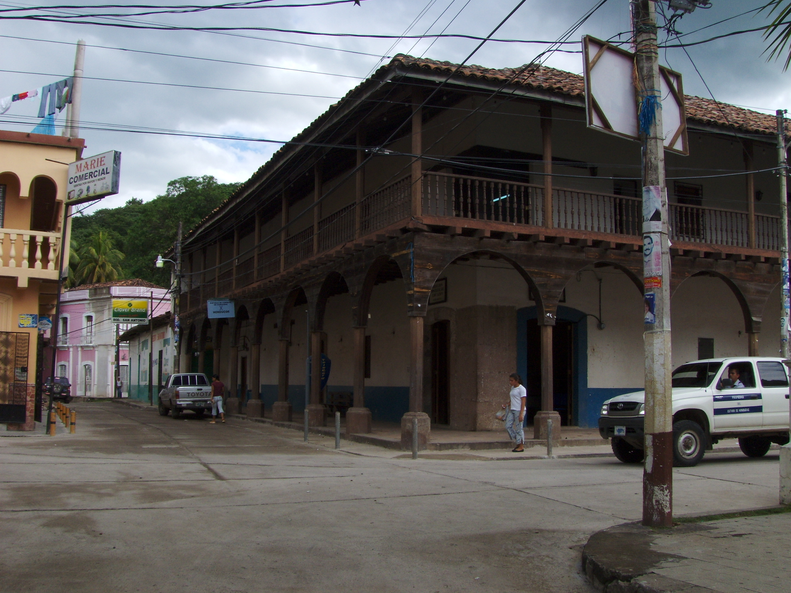 Sede de la Municipalidad de Pespire, en la ciudad del mismo nombre en el Departamento de Choluteca en Honduras